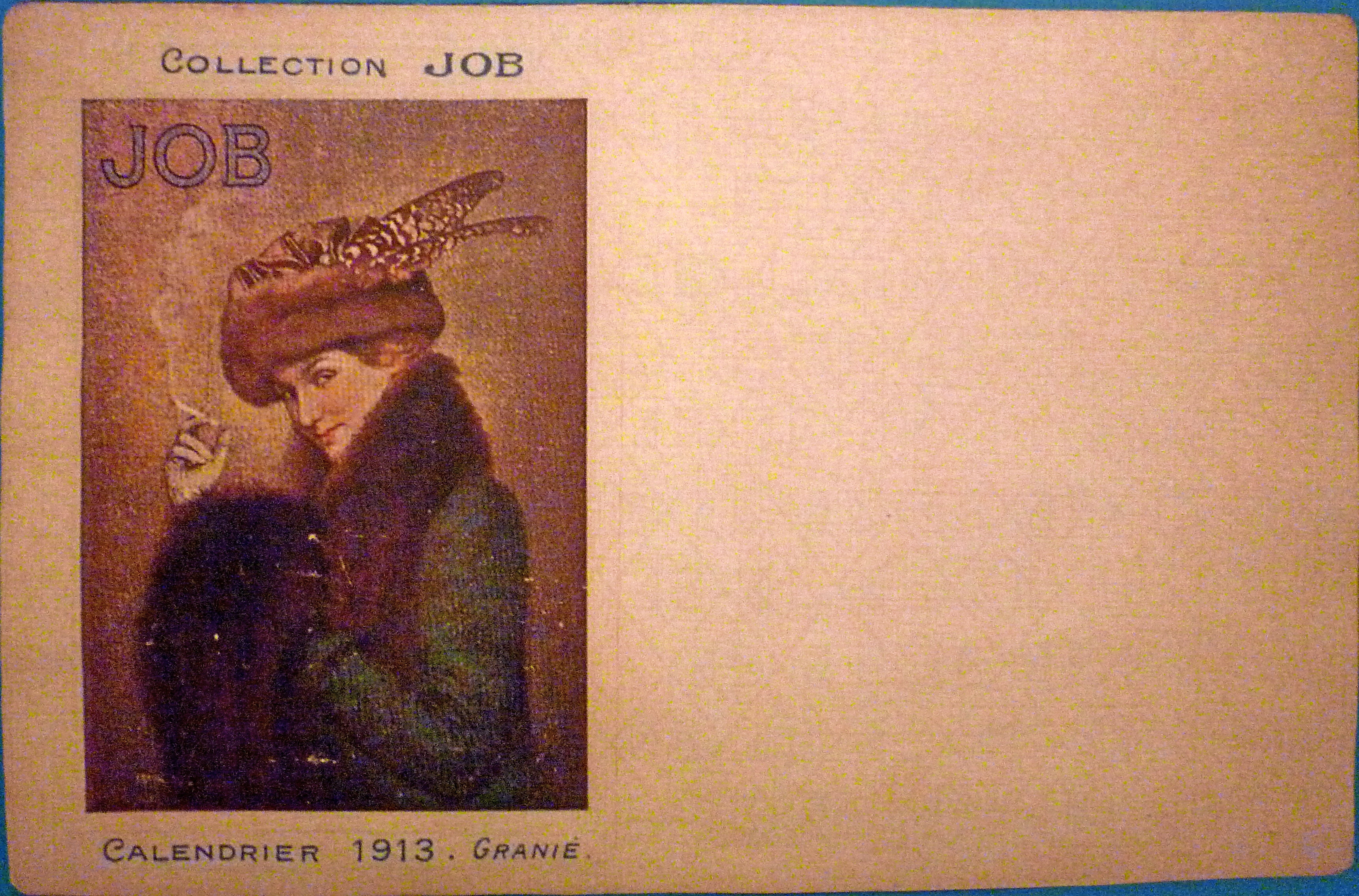 carte postale pour la Collection JOB par Joseph Granié